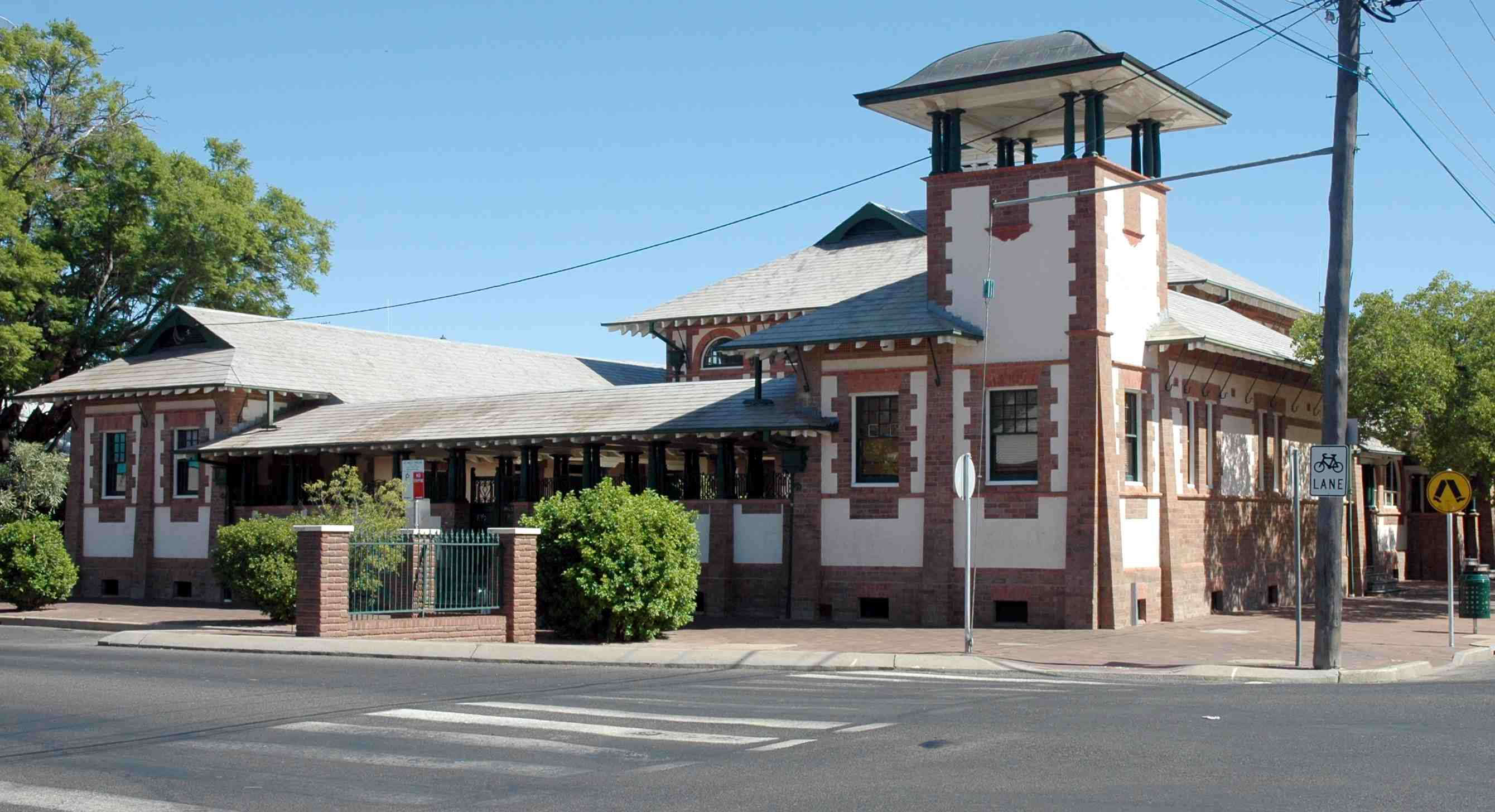 Le palais de justice de Bourke, Nouvelle-Galles du Sud, Australie.